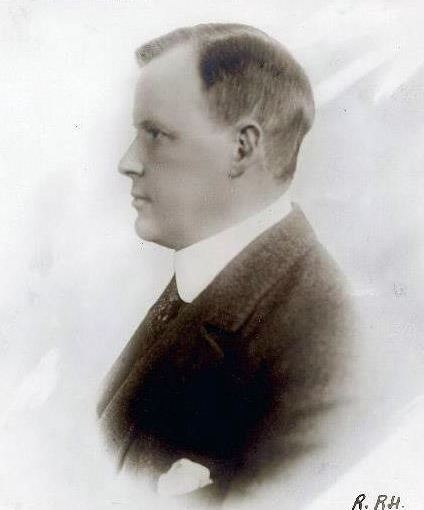 Ragnar Rendahl (1878-1929)